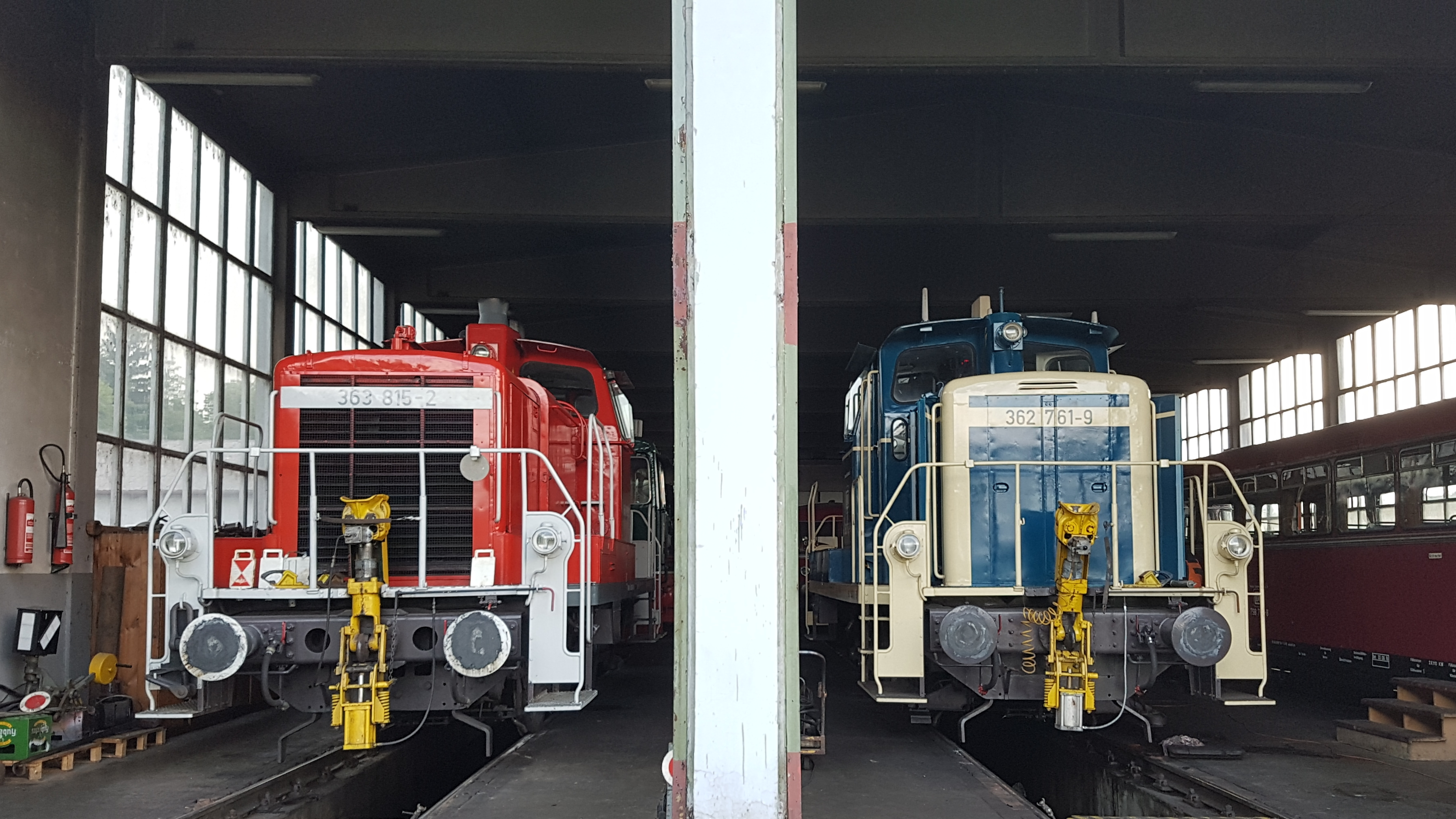 Zwei V60 der Passauer Eisenbahnfreunde, links die verkehrsrote V60 in schwerer Bauart, rechts die ozeanblau-beige V60 in leichter Bauart